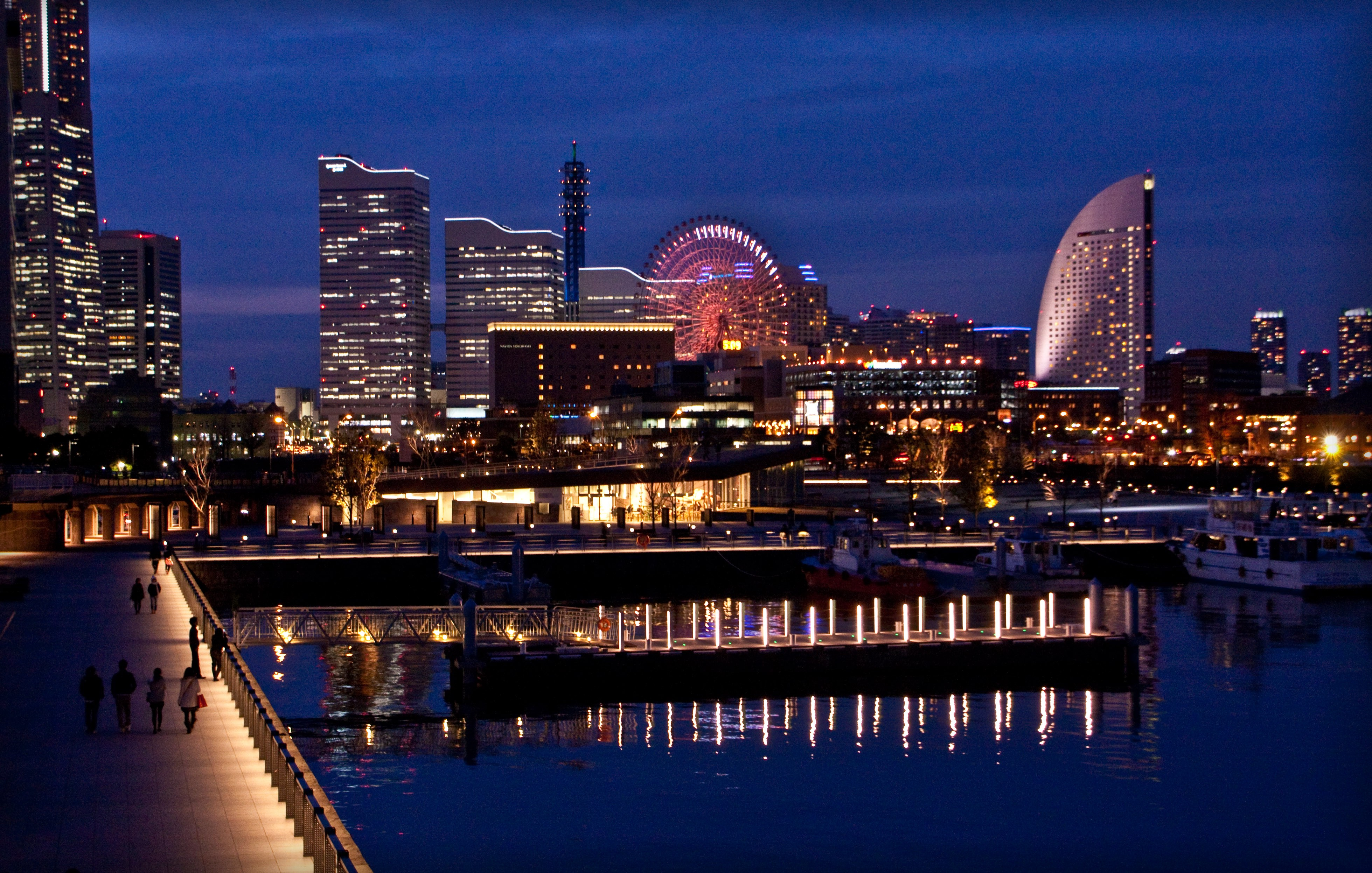 Yokohama, Japan (2010)